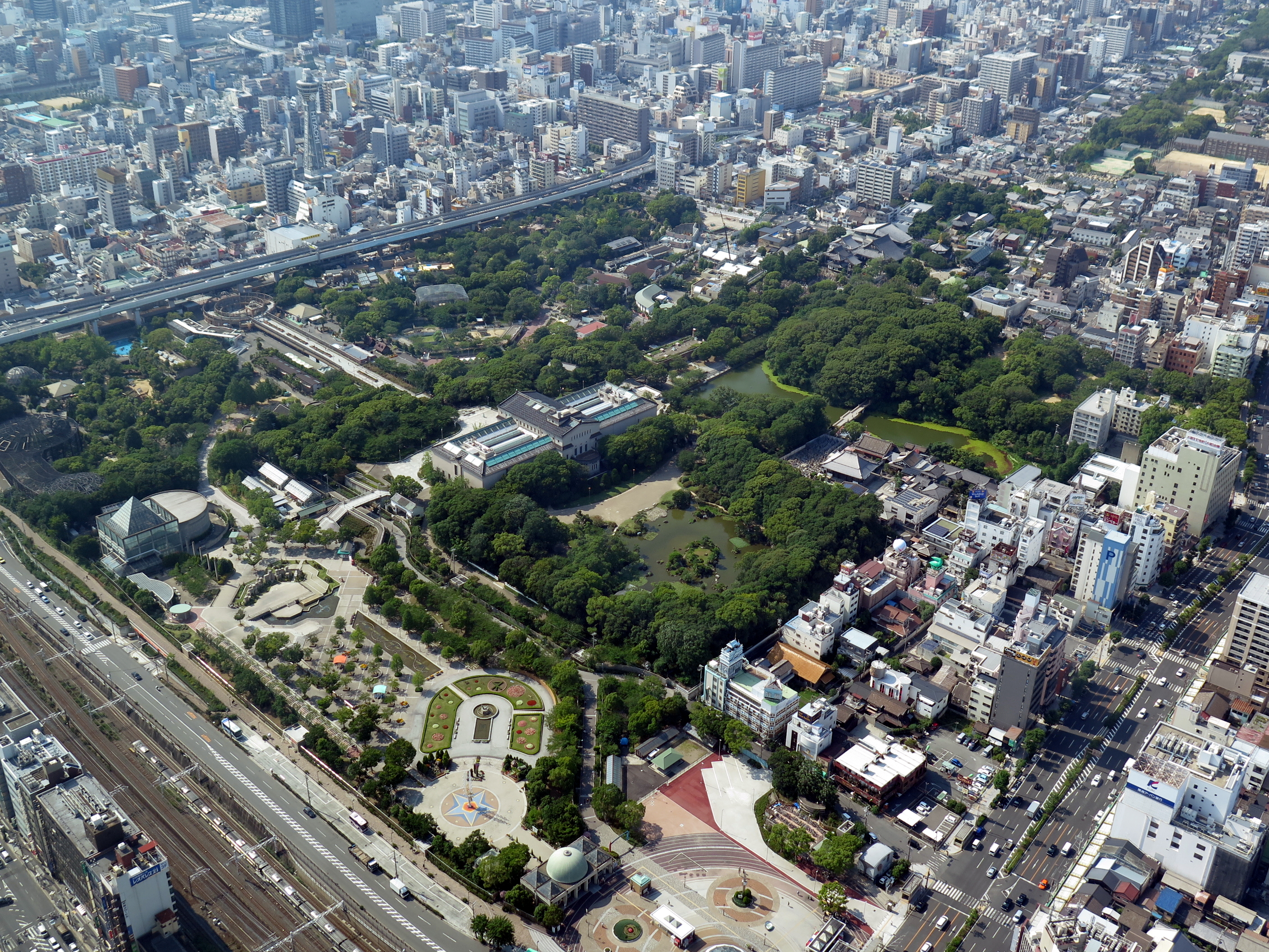 Tennoji Zoo overview